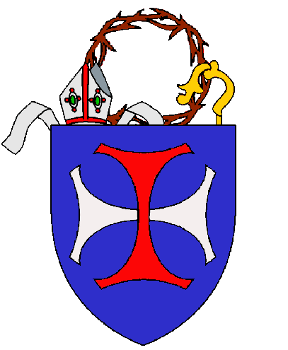 Armes des Chanoines de Sainte-Croix-de-la-Bretonnerie